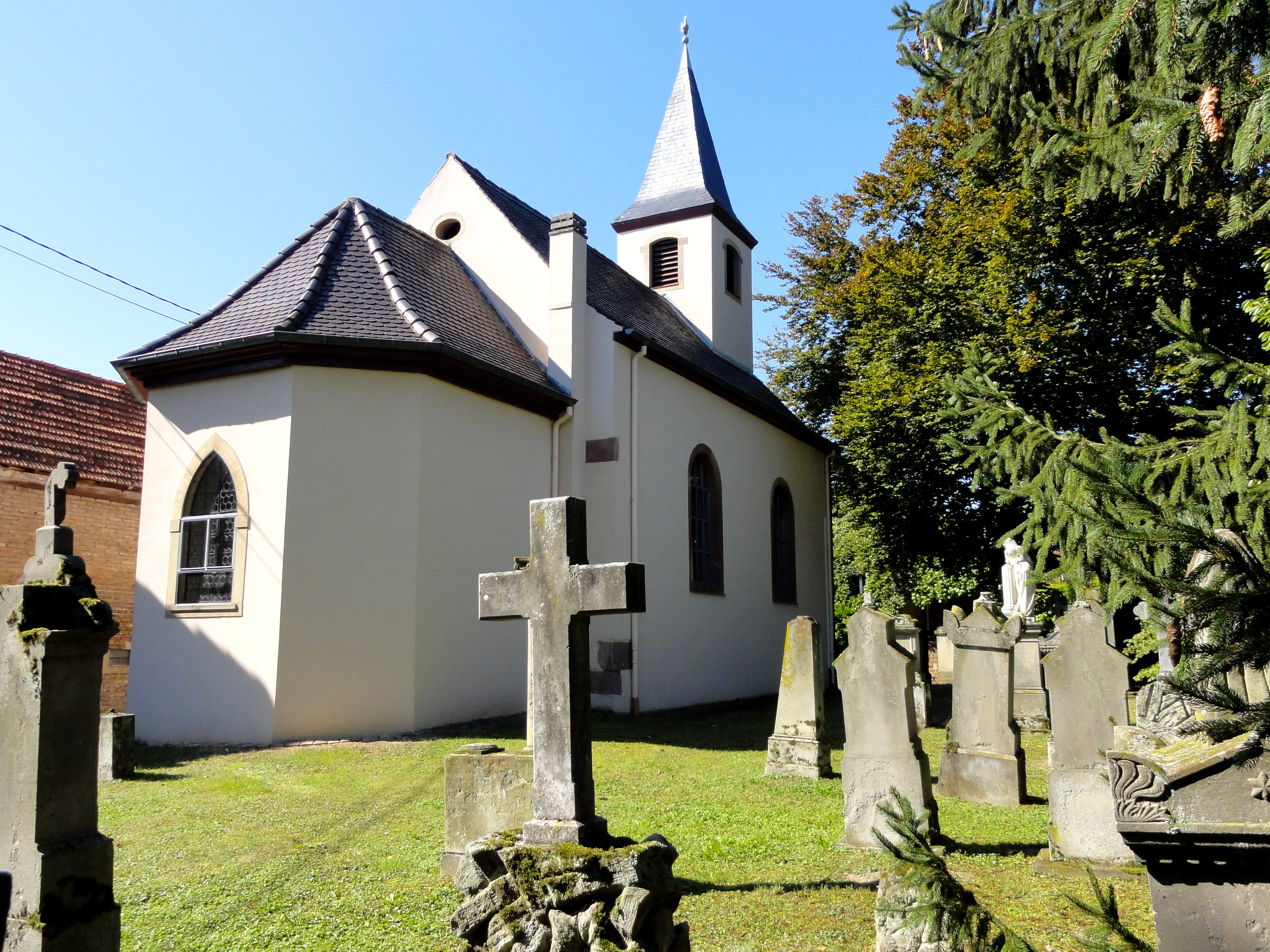 Alsace, Bas-Rhin, Handschuheim, Église protestante (1686-1740)